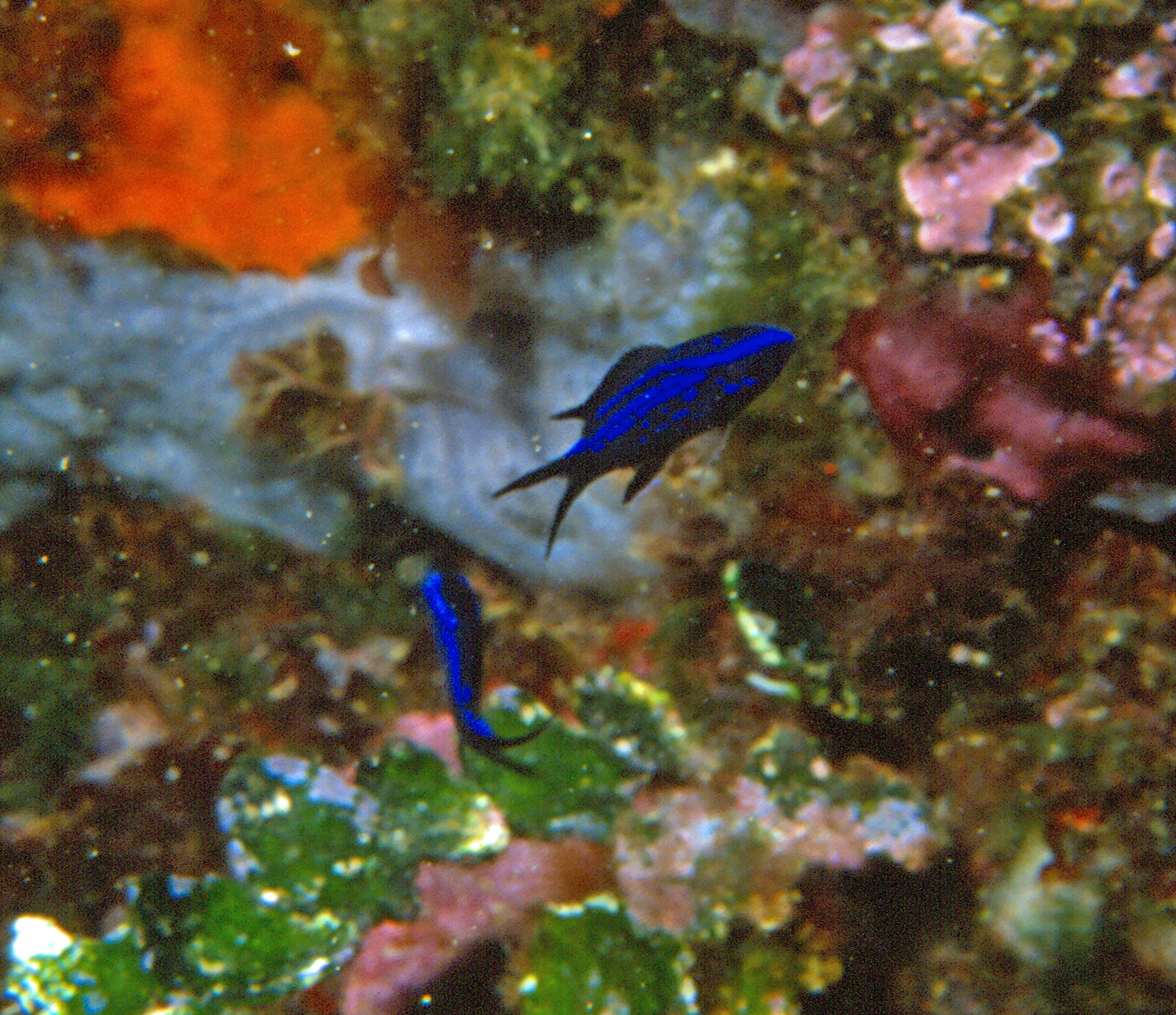 Chromis chromis (Linnaeus, 1758), juvéniles - Banyuls-sur-Mer, Ste Catherine : 08/82